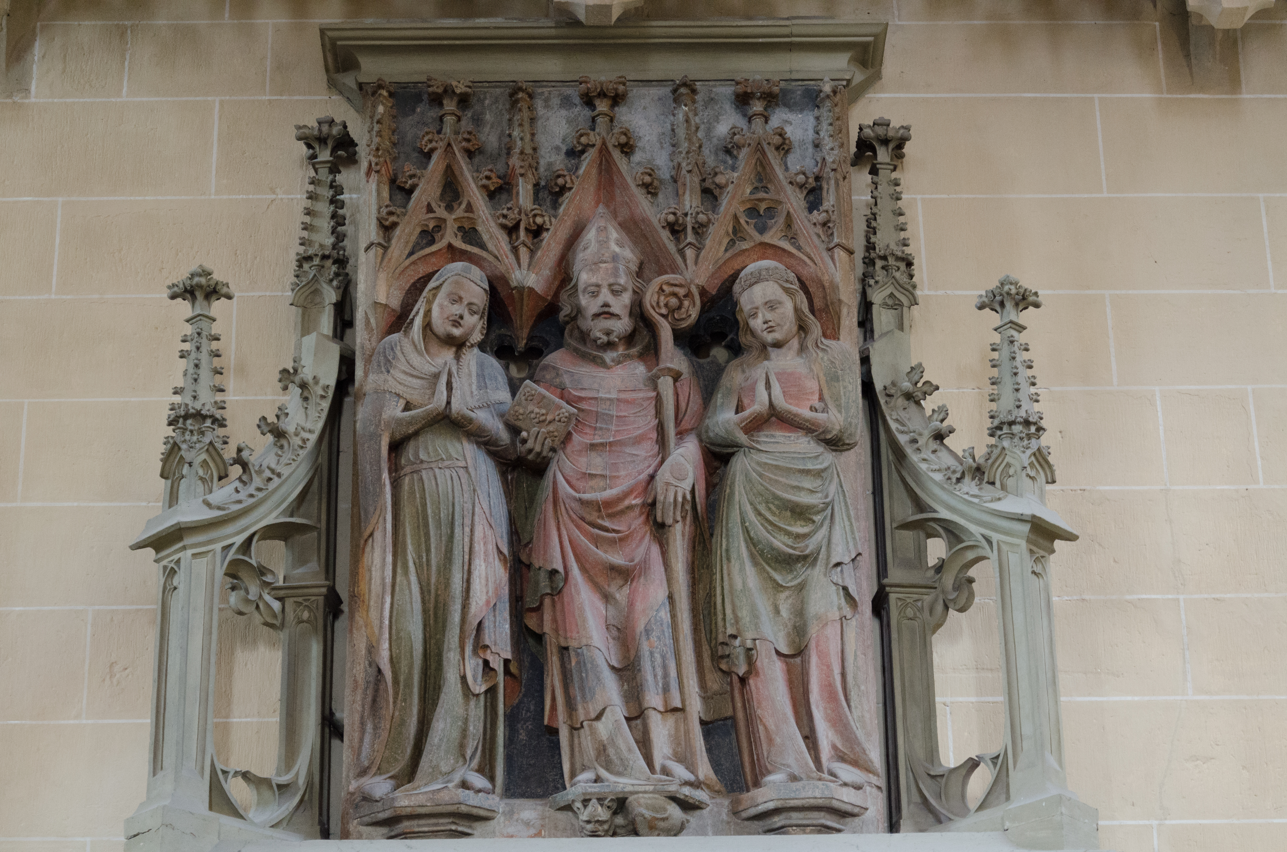 St. Severi Kirche in Erfurt